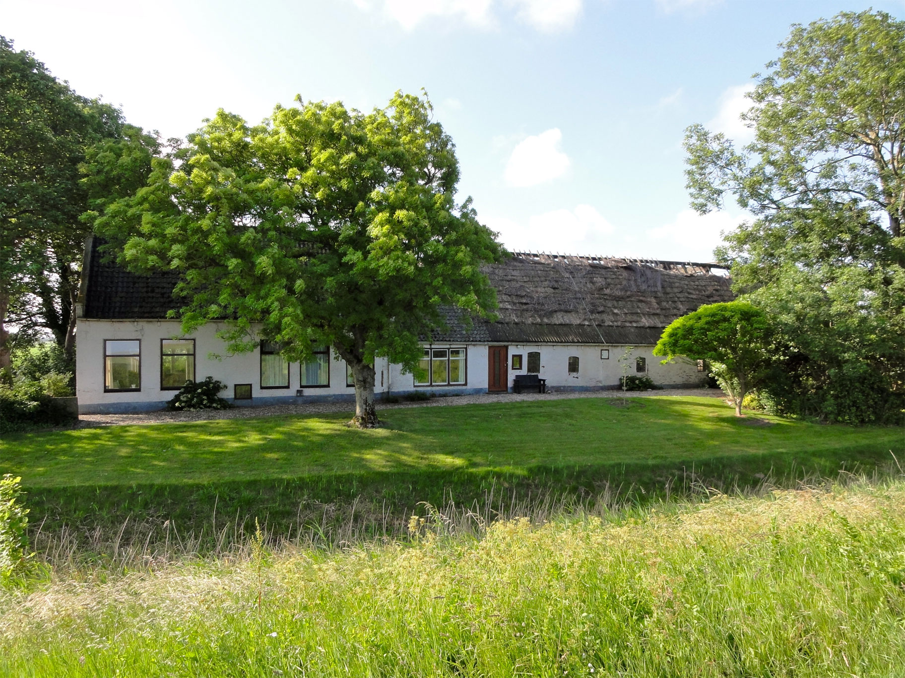 Oudebildtdijk 1059 in Sint-Jacobiparochie